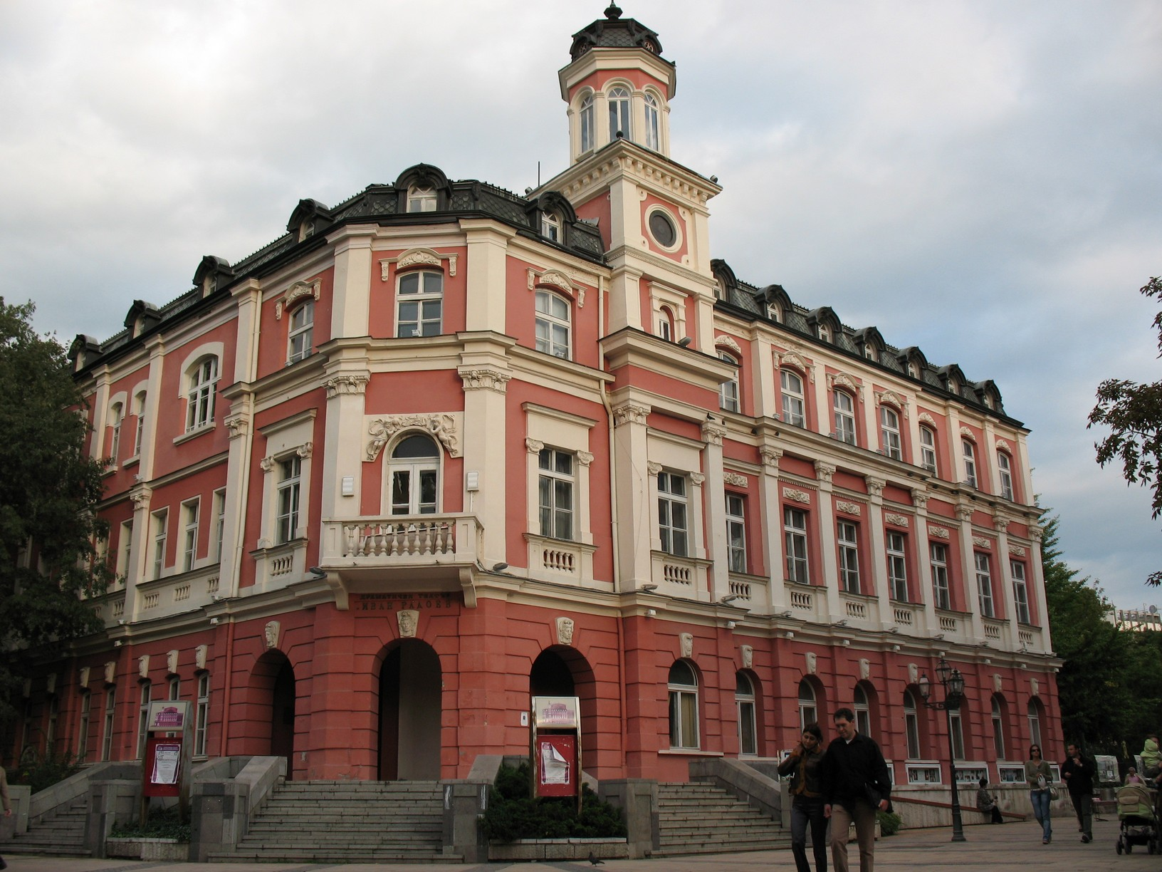 Dramatic Theatre / Драматичен театър „Иван Радоев“